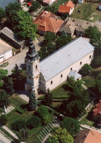 Szabadszállás, Hungary, aerialphotography